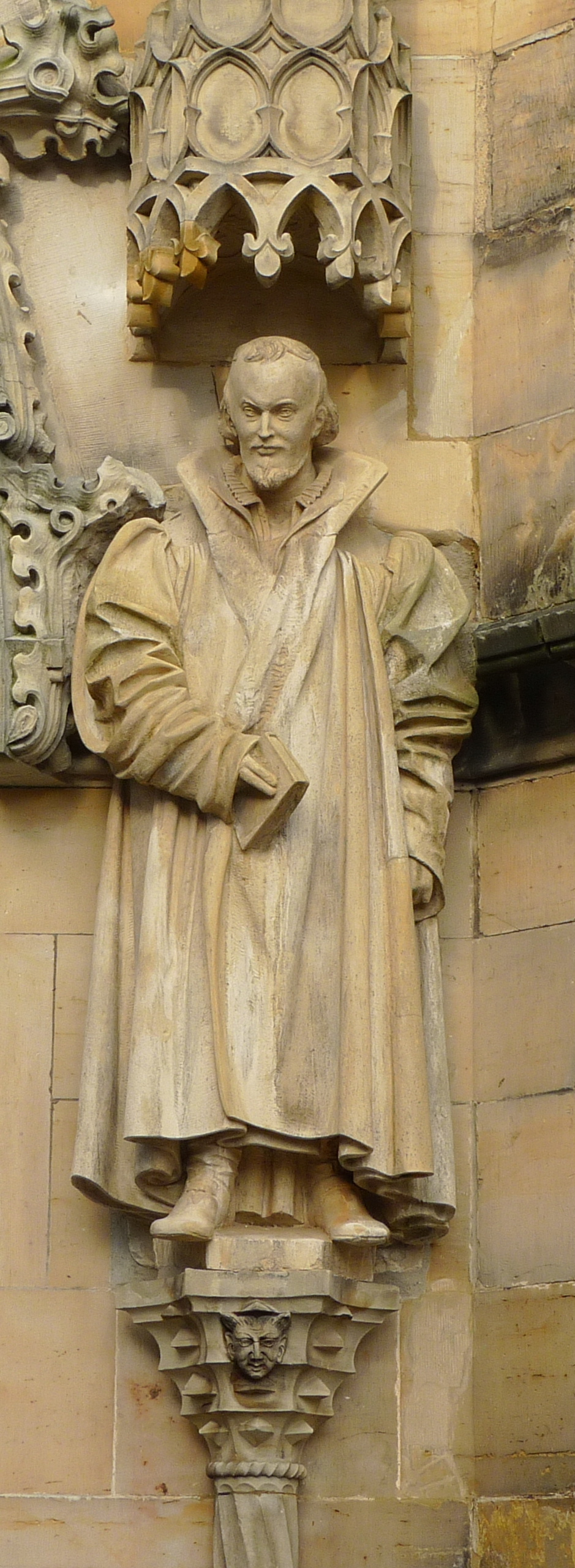 Christian Behrens: Philipp Melanchthon (um 1900) - Baldachinfigur am „Brautprotal“ der Margarethenkirche in Gotha